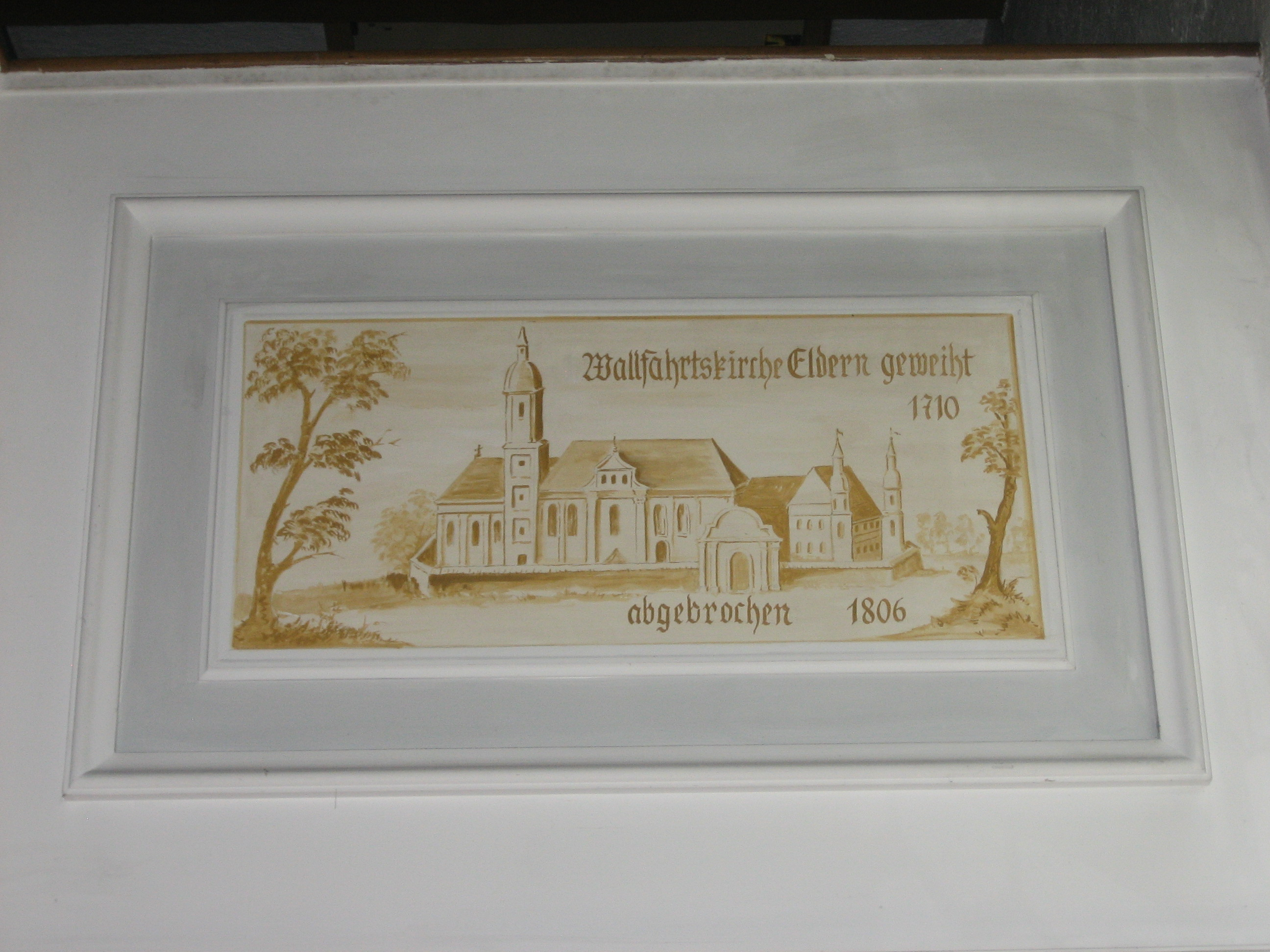 Wallfahrtskapelle Eldern, bei Ottobeuren, Landkreis Unterallgäu, Bayern